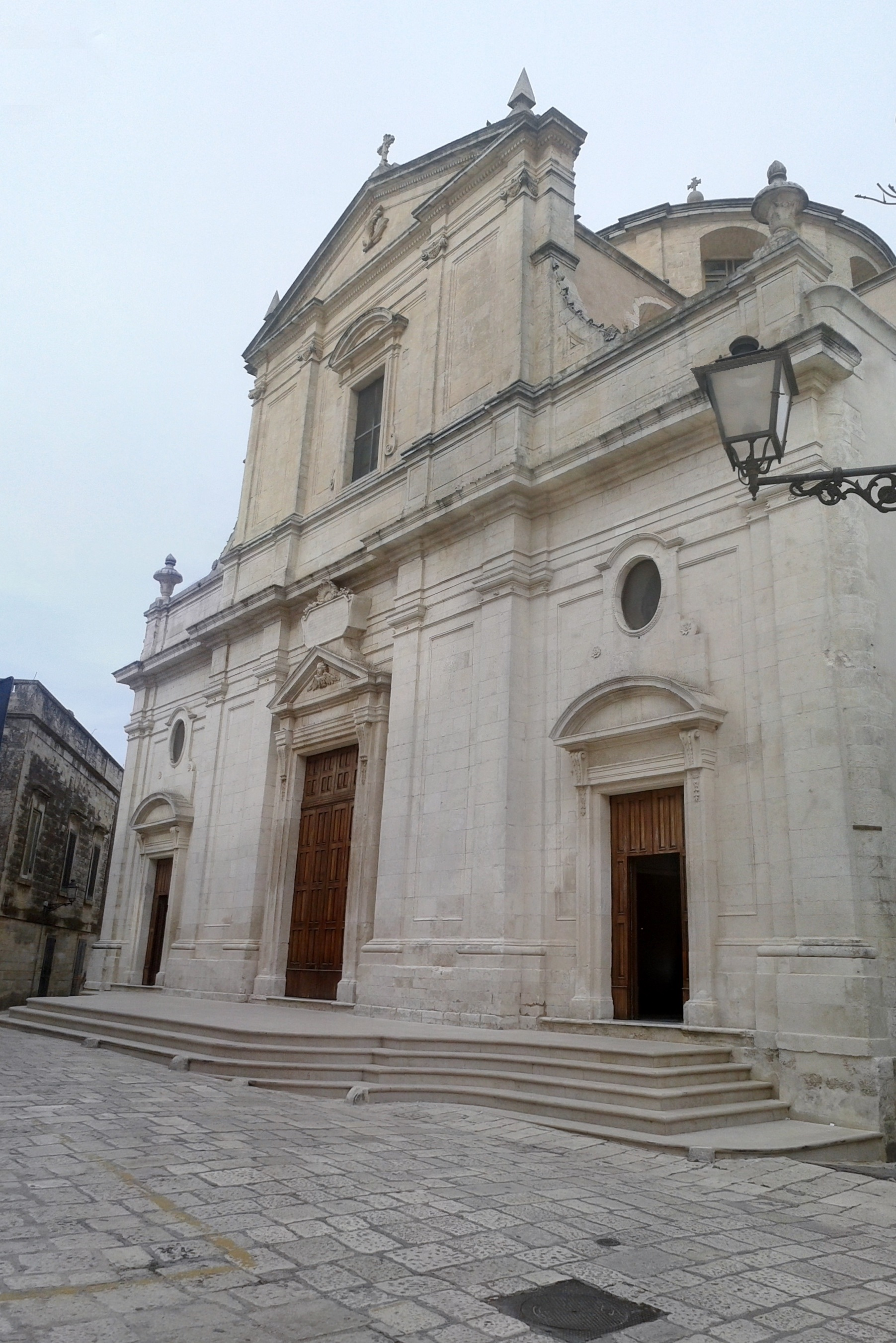 Facciata della Collegiata di Ceglie Messapica, Chiesa consacrata al culto della Vergine Assunta. L'attuale edificio risale al 1786.